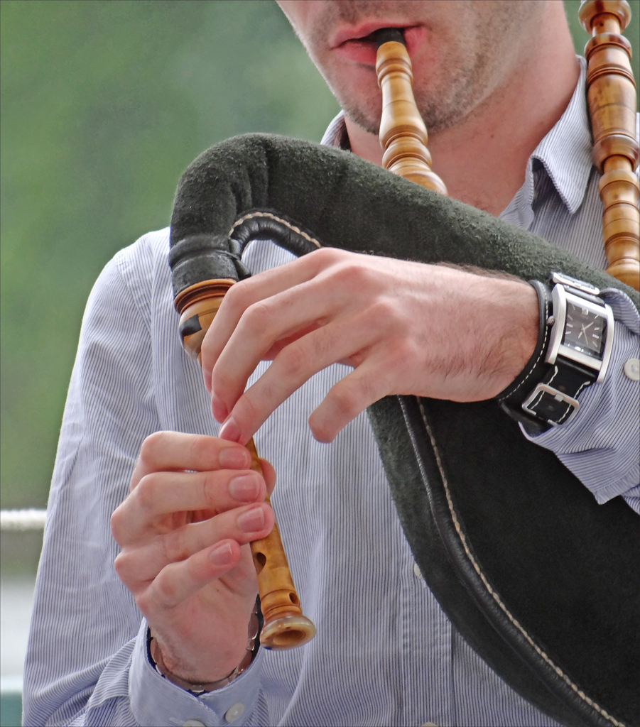 Sonneur de biniou koz dans le cadre du festival Les Orientales Musiques et traditions d'Orient Saint-Florent-le-Vieil